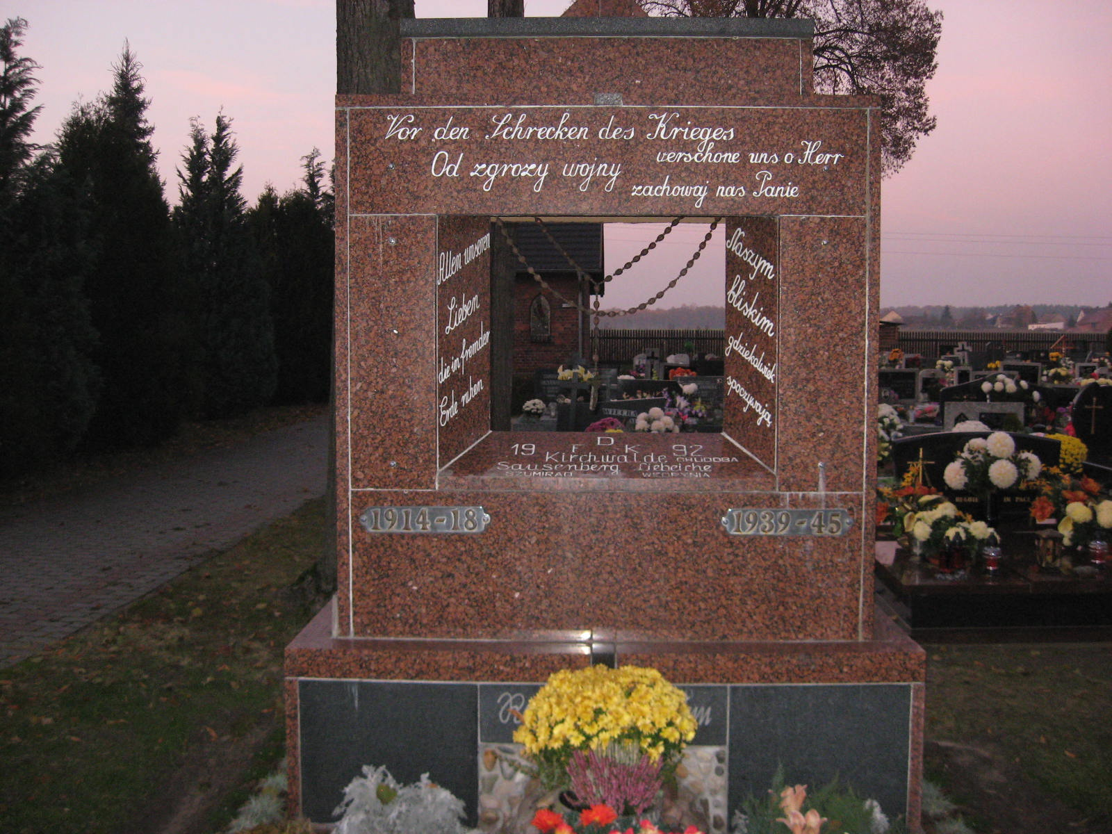 Kościół Najświętszego Serca Pana Jezusa w Chudobie